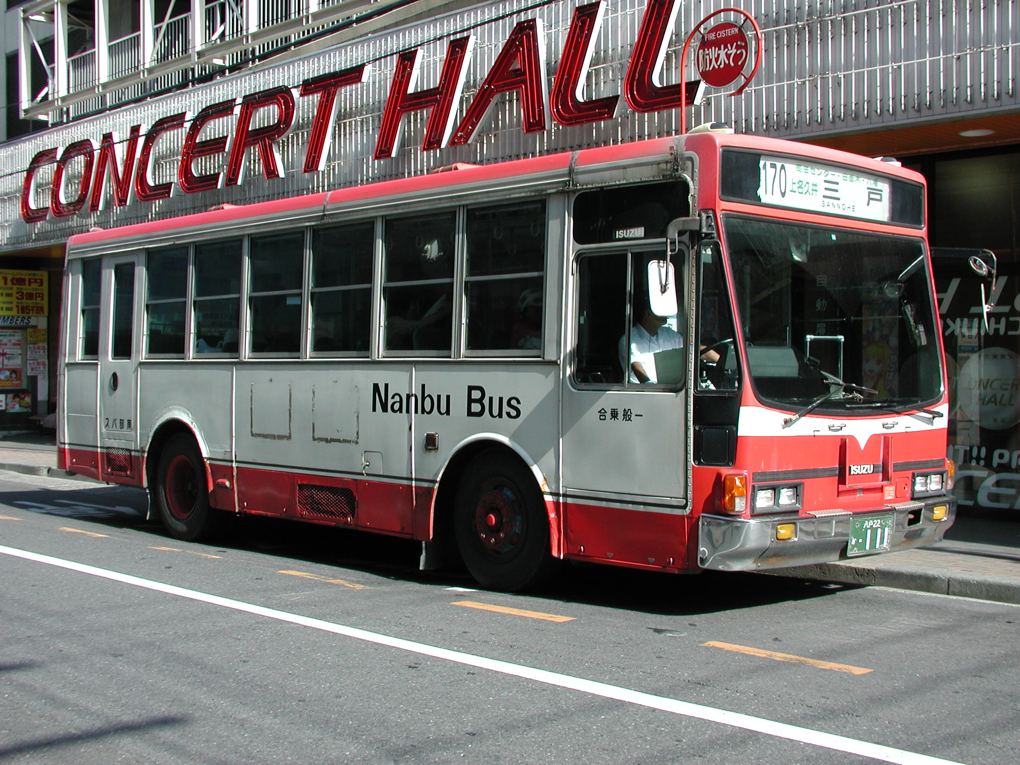 南部バス一般路線塗装 （いすゞ・キュービックLT・P-LT312J） 六日町バス停（八戸市）近くにて